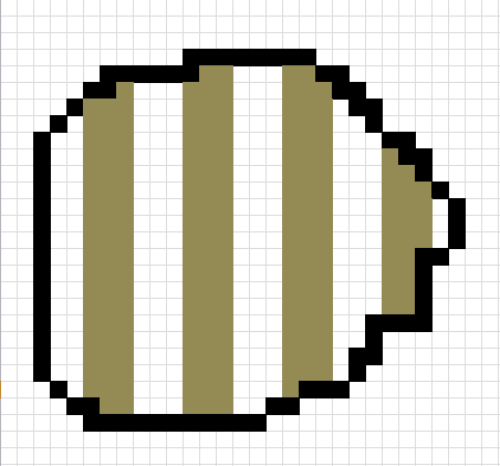 Continous strip sampling pada suatu kawasan hutan